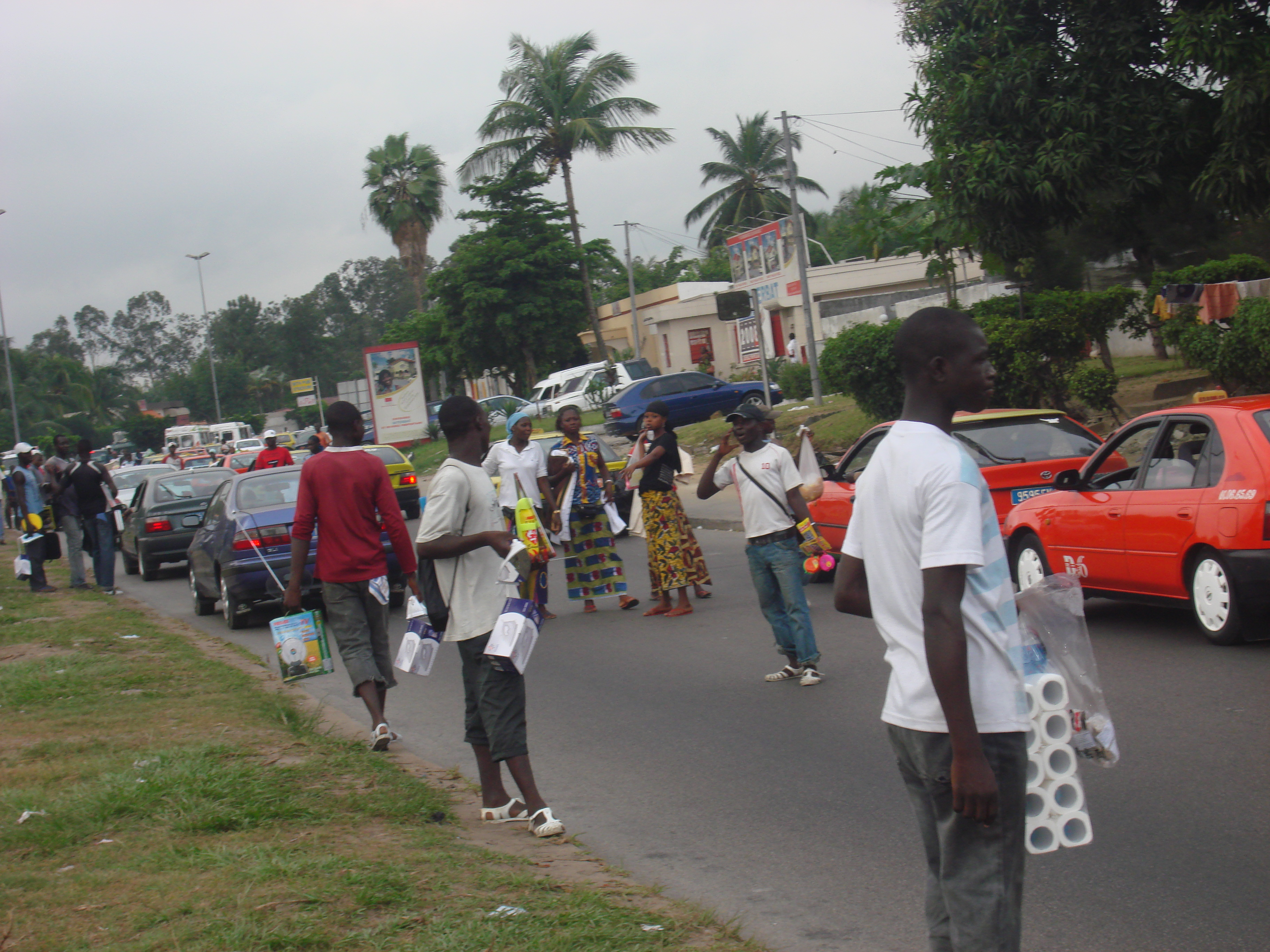 Marchands ambulants dans les rues d'Abidjan (Côte d'Ivoire)